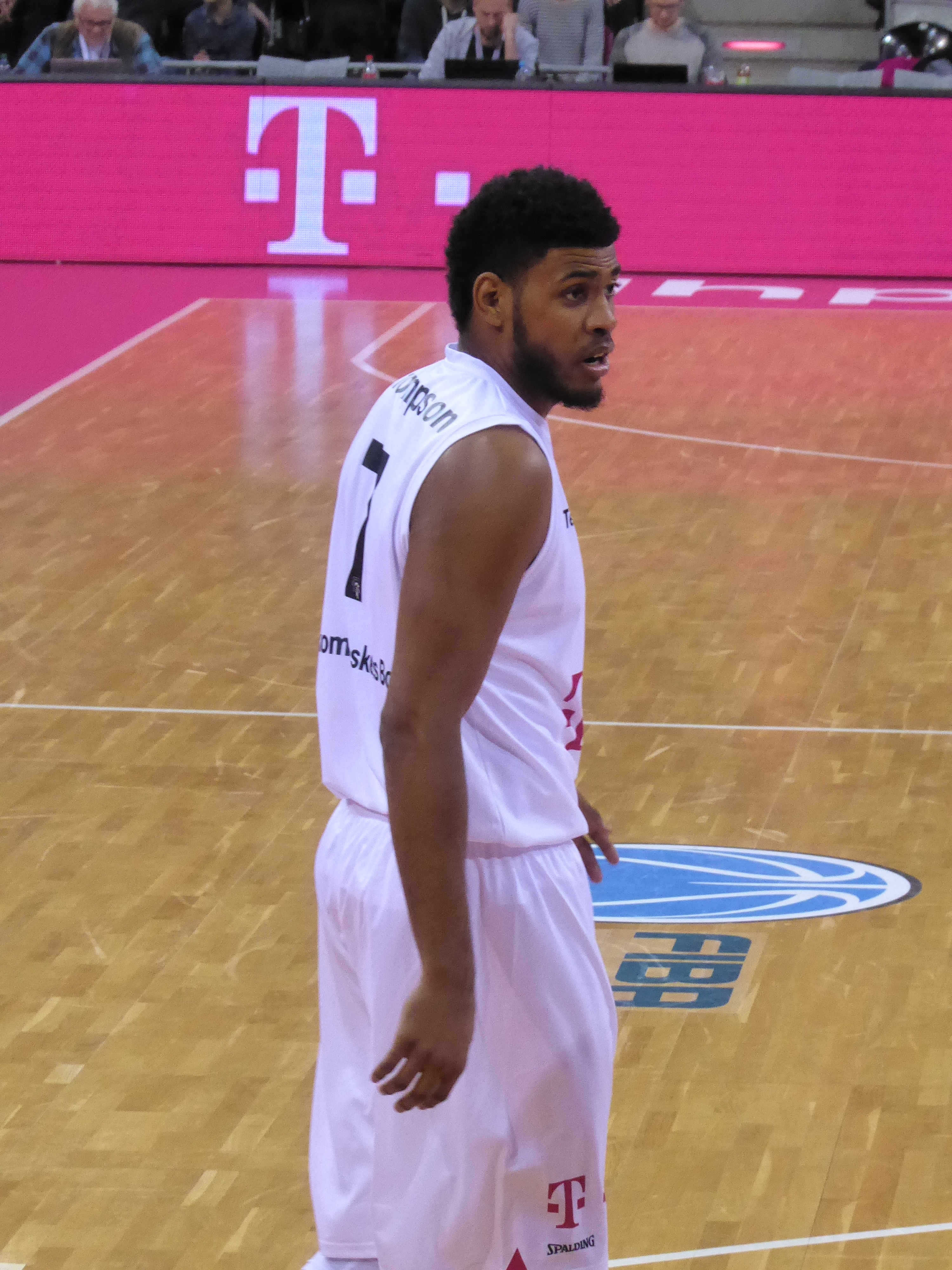 Ryan Thompson beim Spiel der Telekom Baskets Bonn gegen APOEL Nicosia am 14. Dezember 2016.